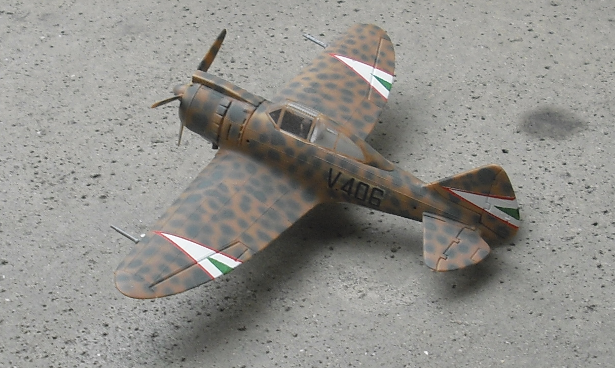 Modellbild der MÁVAG Hejja